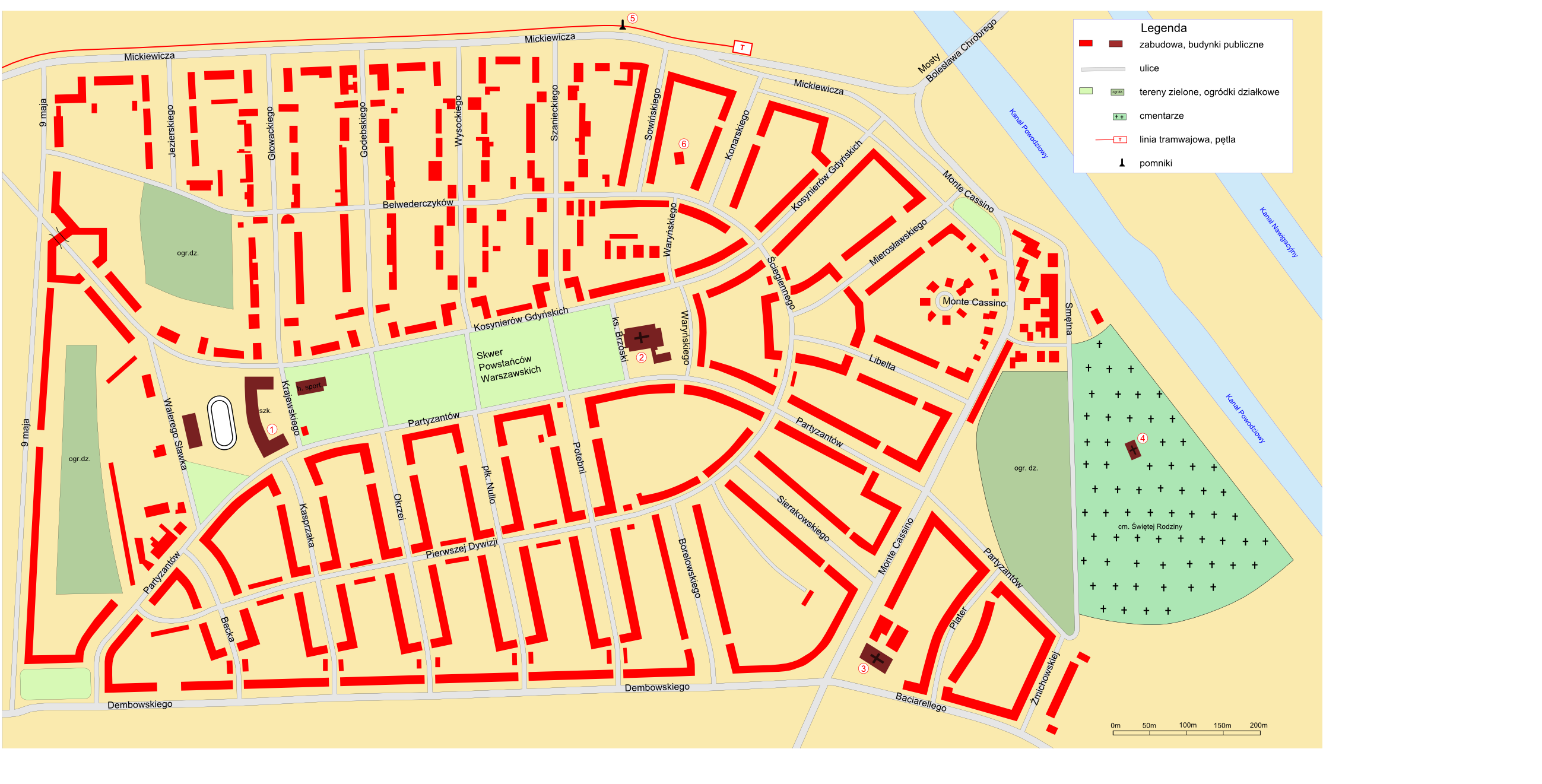 mapa osiedle Sepolno (wersja rastrowa)